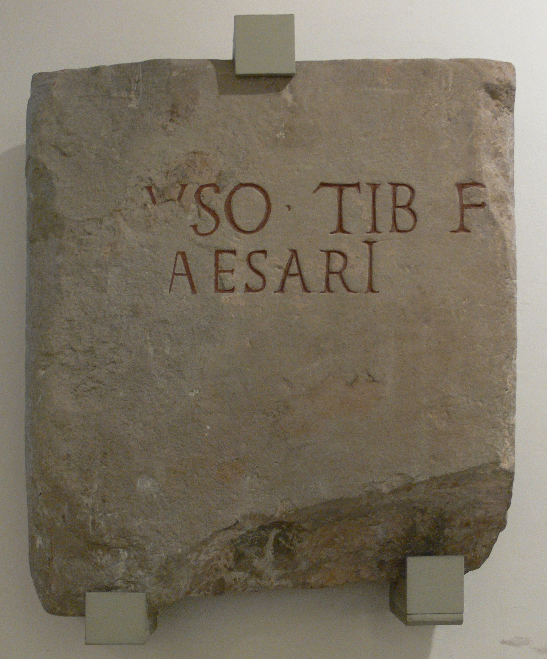 Ehreninschrift (Statuenbasis?) aus Brigantium für Drusus den Jüngeren, Sohn des Tiberius (ca. 15 v. Chr. – 23 n. Chr.), errichtet nach 14 n. Chr., Molassesandstein CIL III, 5769